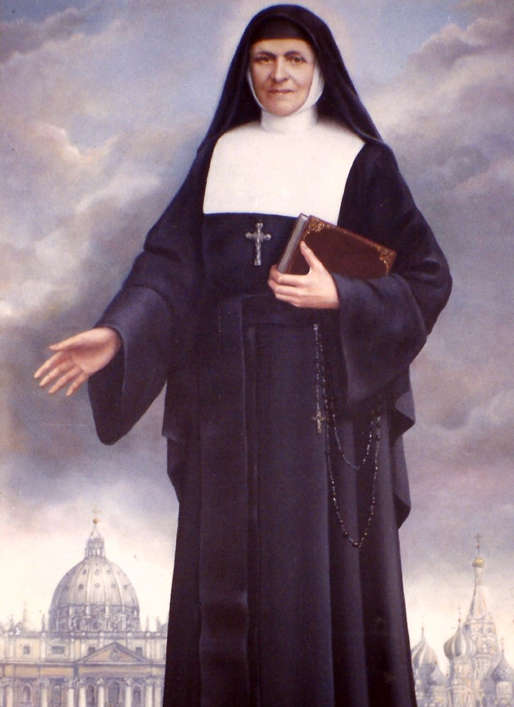 Bolesława Lament obraz beatyfikacyjny i jego autor Zbigniew Kotyłło Zdjecie z Mszy beatyfikacyjnej w Białymstoku z udziałem Jana Pawła